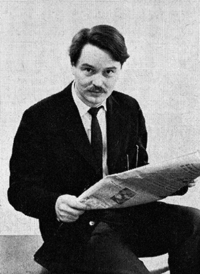 Herbert Söderström